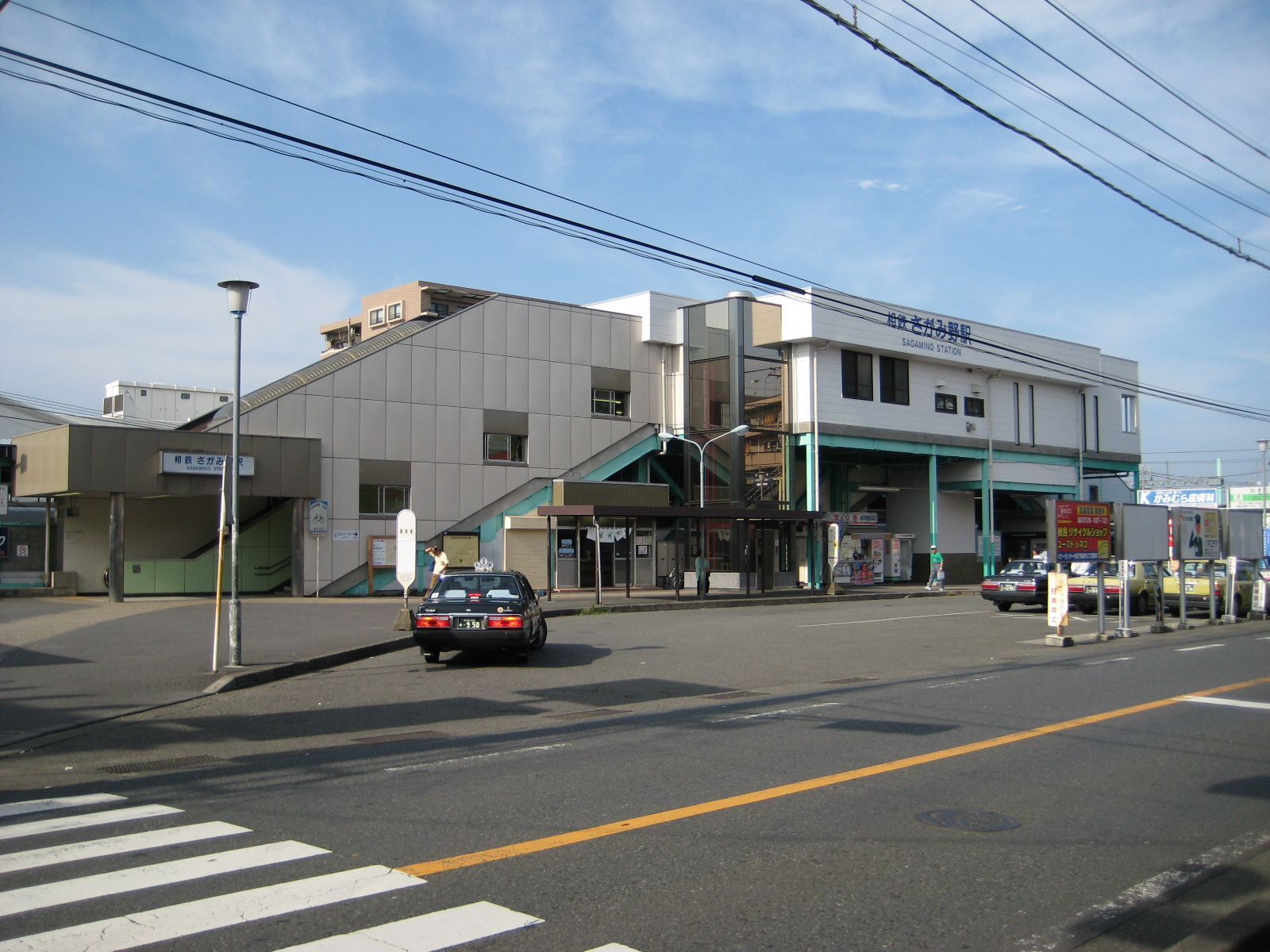 Sagamino Station, on the Sotetsu Main Line, Ebina, Kanagawa さがみ野駅